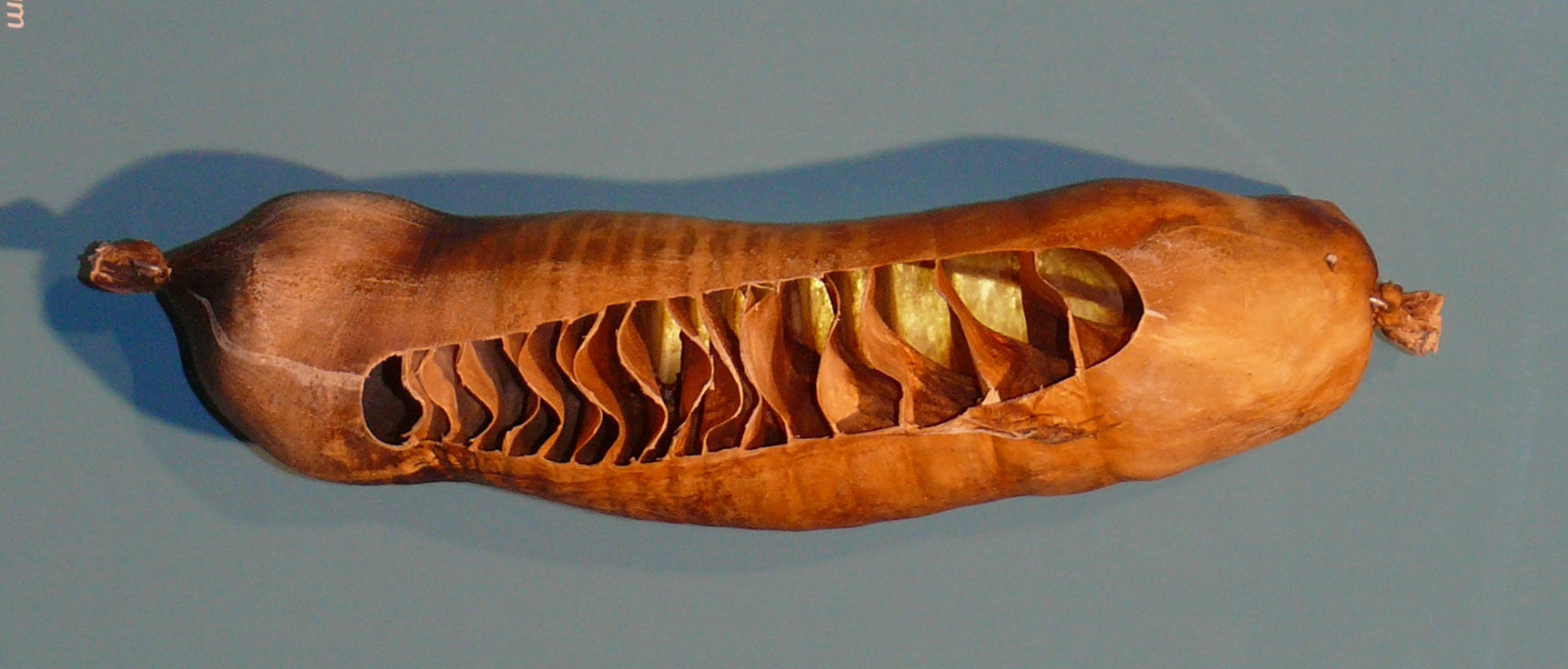 Spiraldarm des Karibikammenhai (Ginglymostoma cirratum).